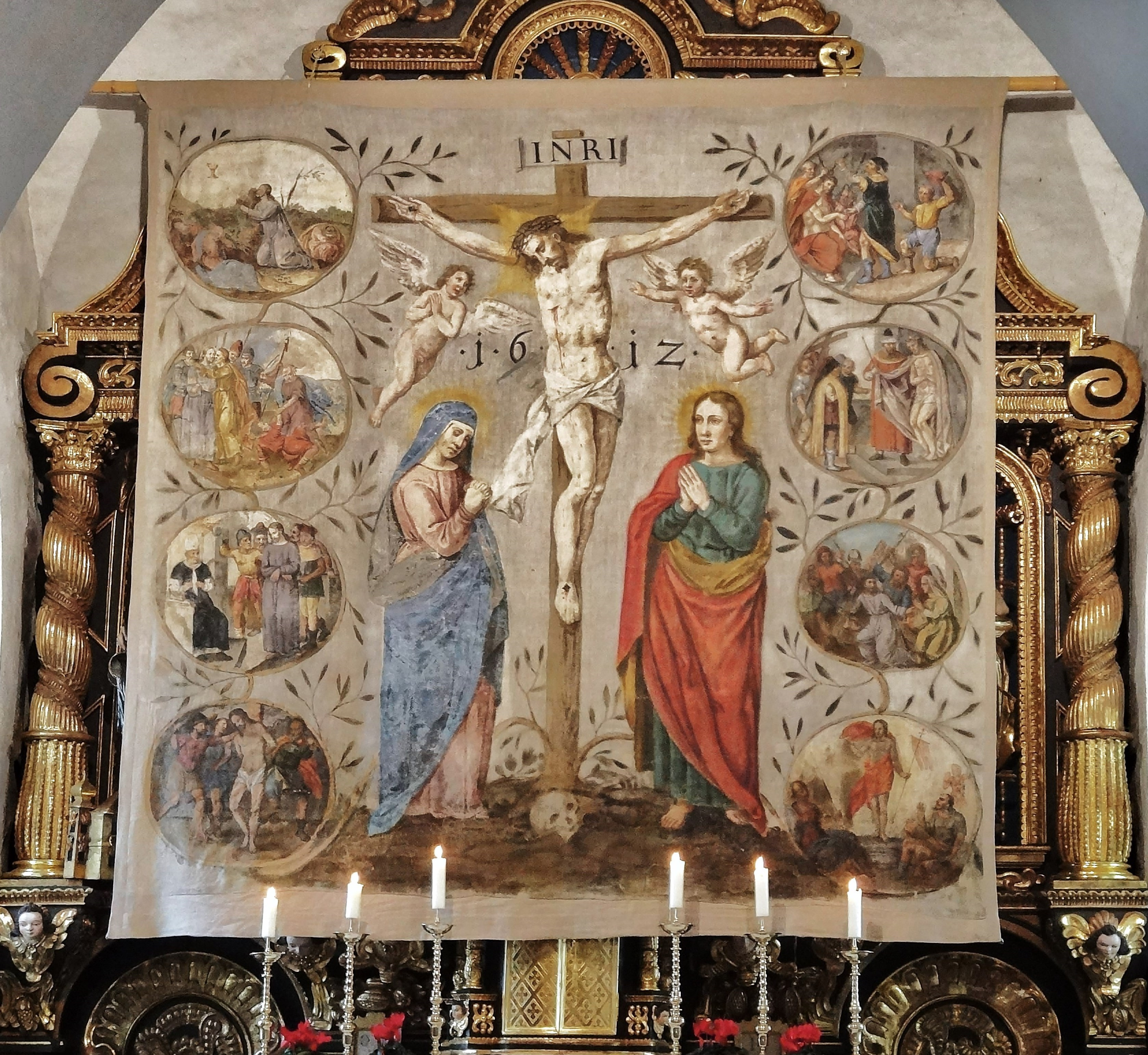 Kath. Pfarrkirche St. Stefan am Krappfeld, Fastentuch von 1612